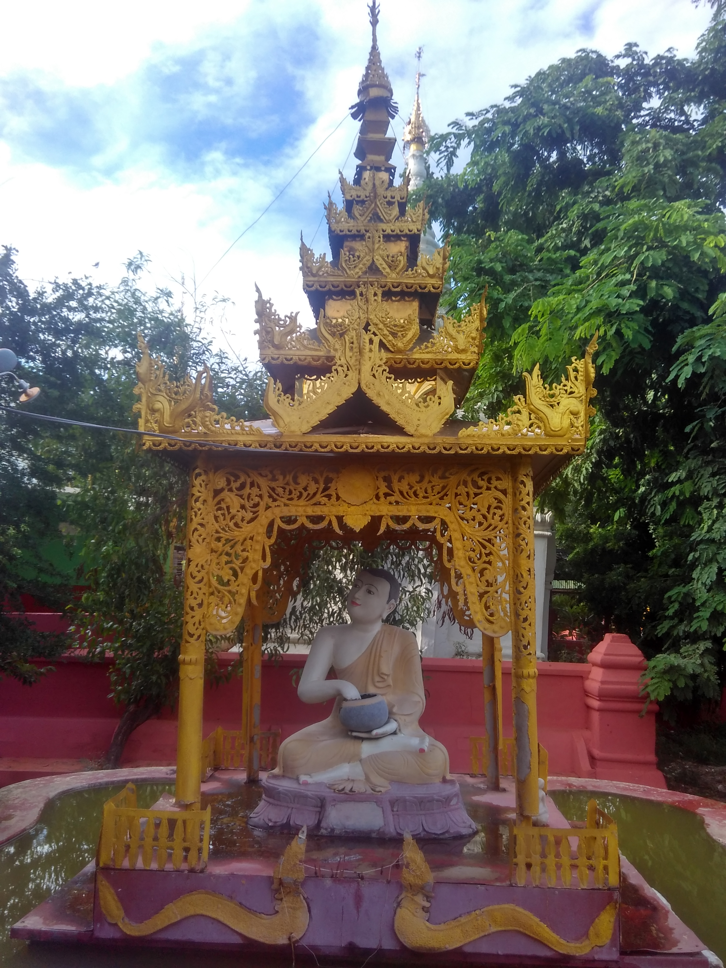 မြန်မာဘာသာ: ရှင်ဥပဂုတ္တထေရ်၏ ရုပ်ထု ဖြစ်သည်။ မန္တလေးတိုင်းဒေသကြီး၊ ပလိပ်မြို့၊ မြွေဘုရား တွင်တည်ရှိသည်။